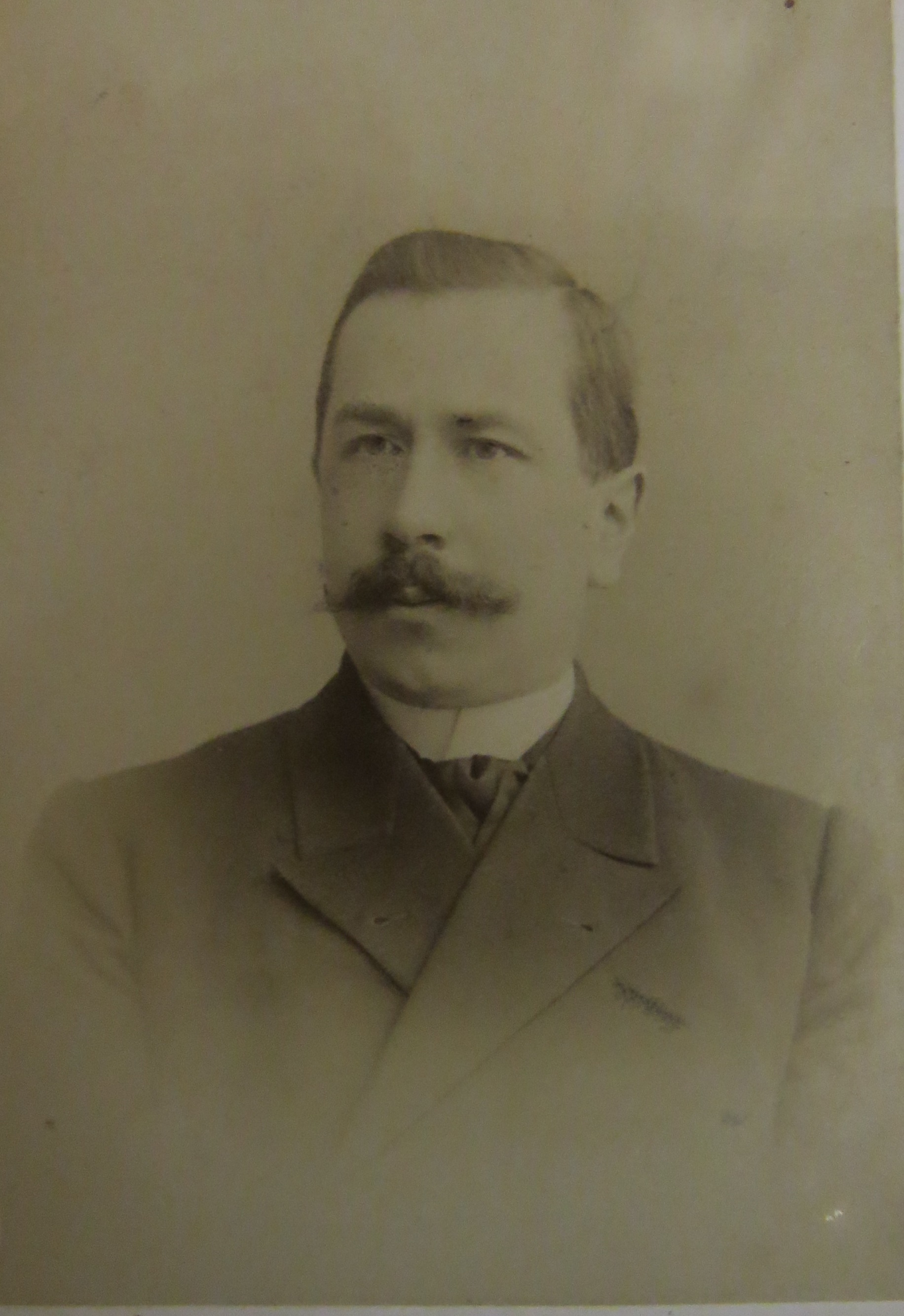 Николай Петрович Чулков. Начало XX в. Фотография из собрания Государственного музея А.С. Пушкина